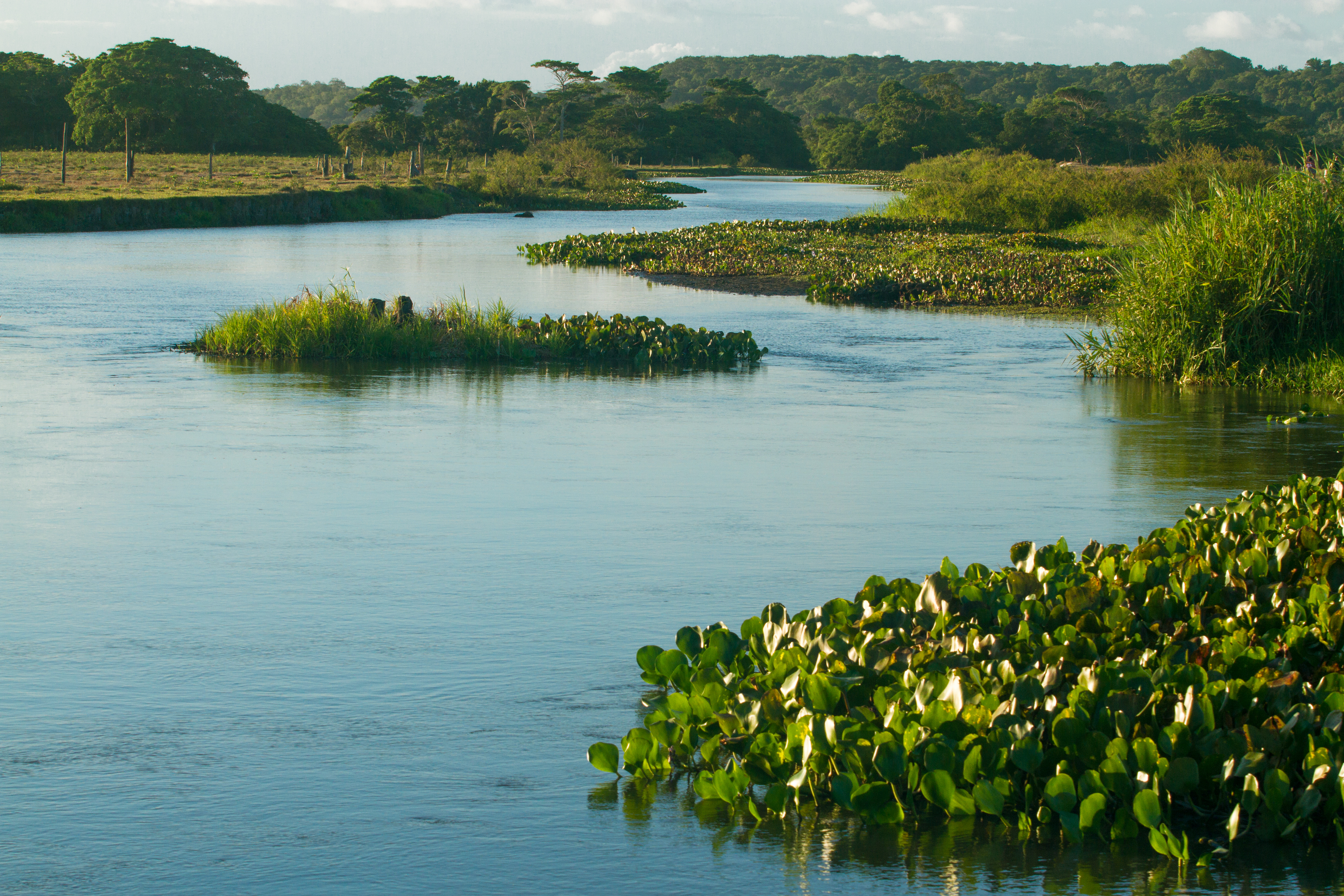 Rio dos Frades, Porto Seguro - BA